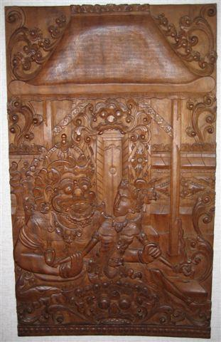 Eigen foto van anoniem houtsnijwerk in eigen bezit.